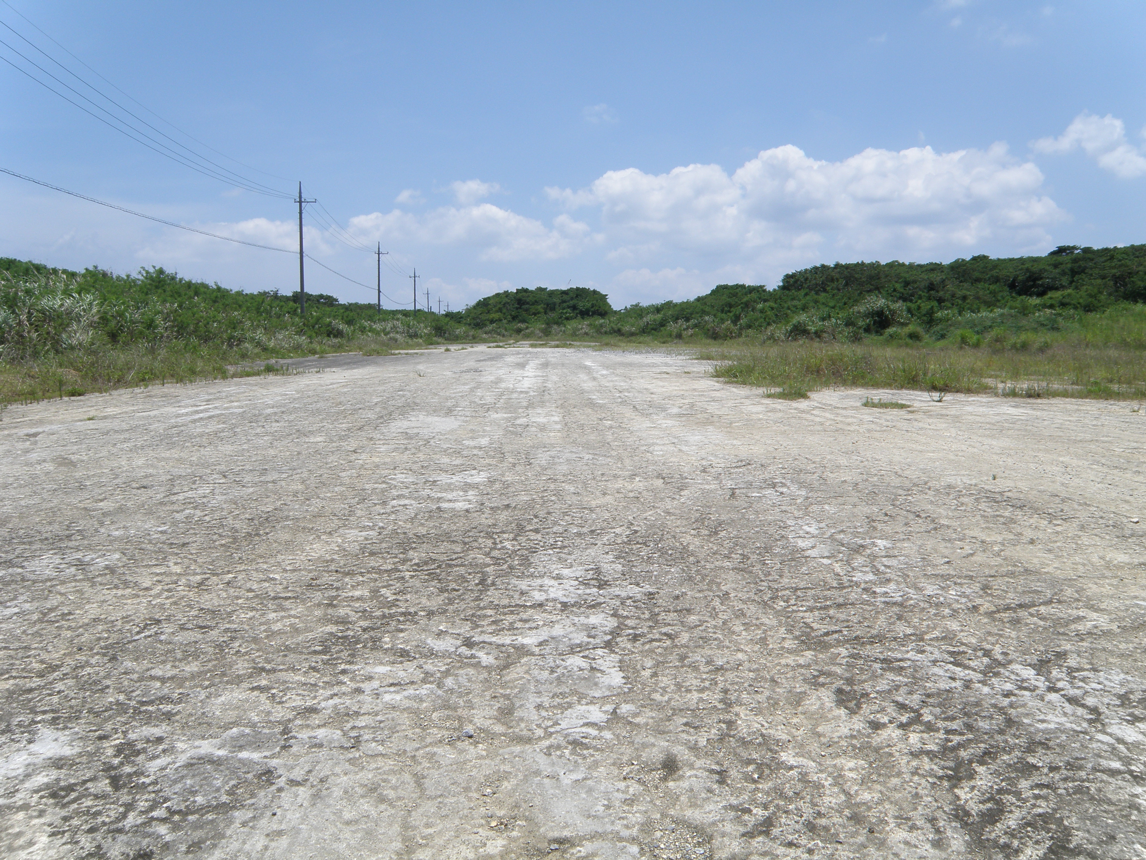 本部飛行場跡